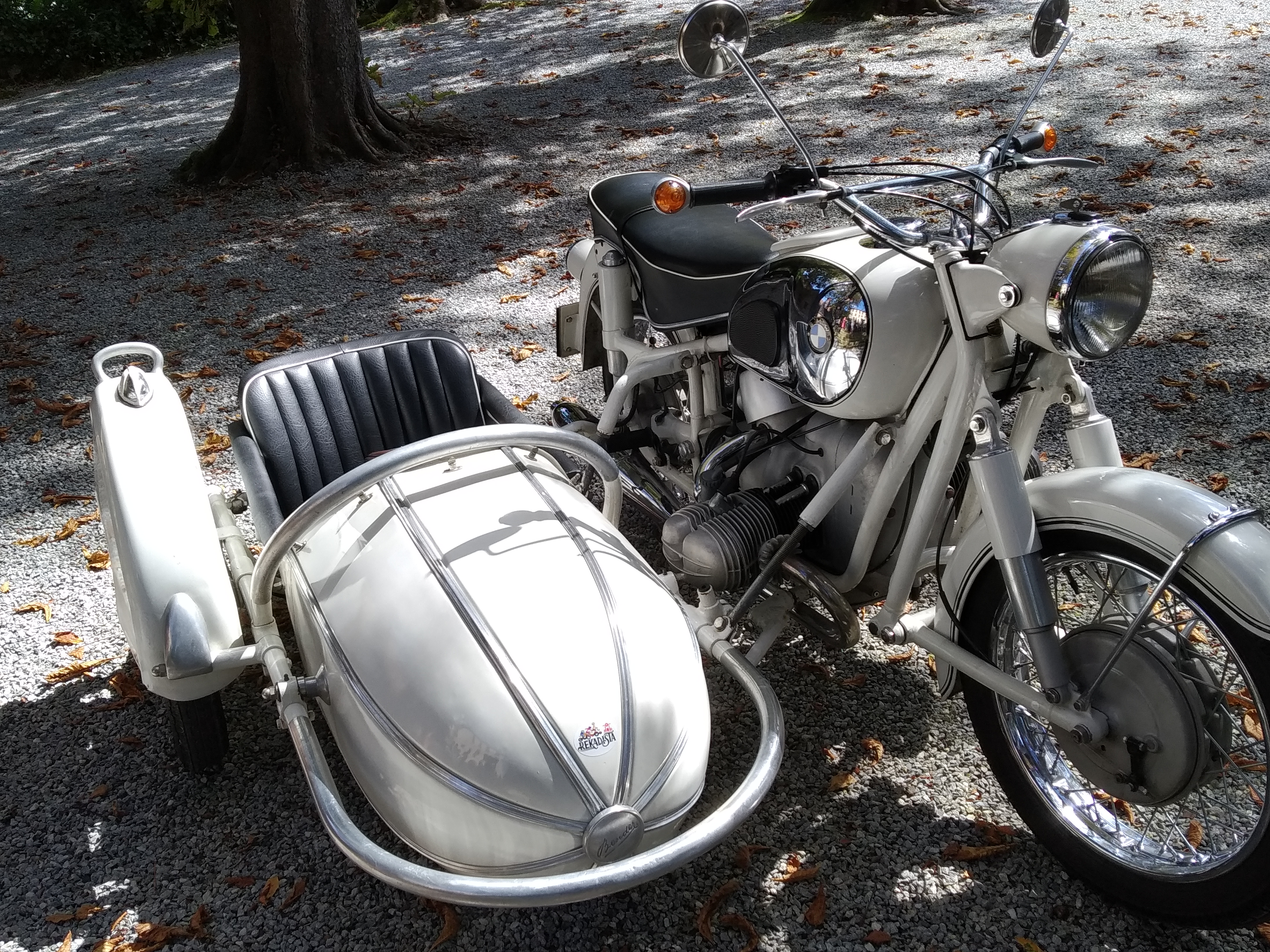 Astigarragan ikusia, Gipuzkoan ezkontzak antolatzen dituen zerbitzu batek alokatua